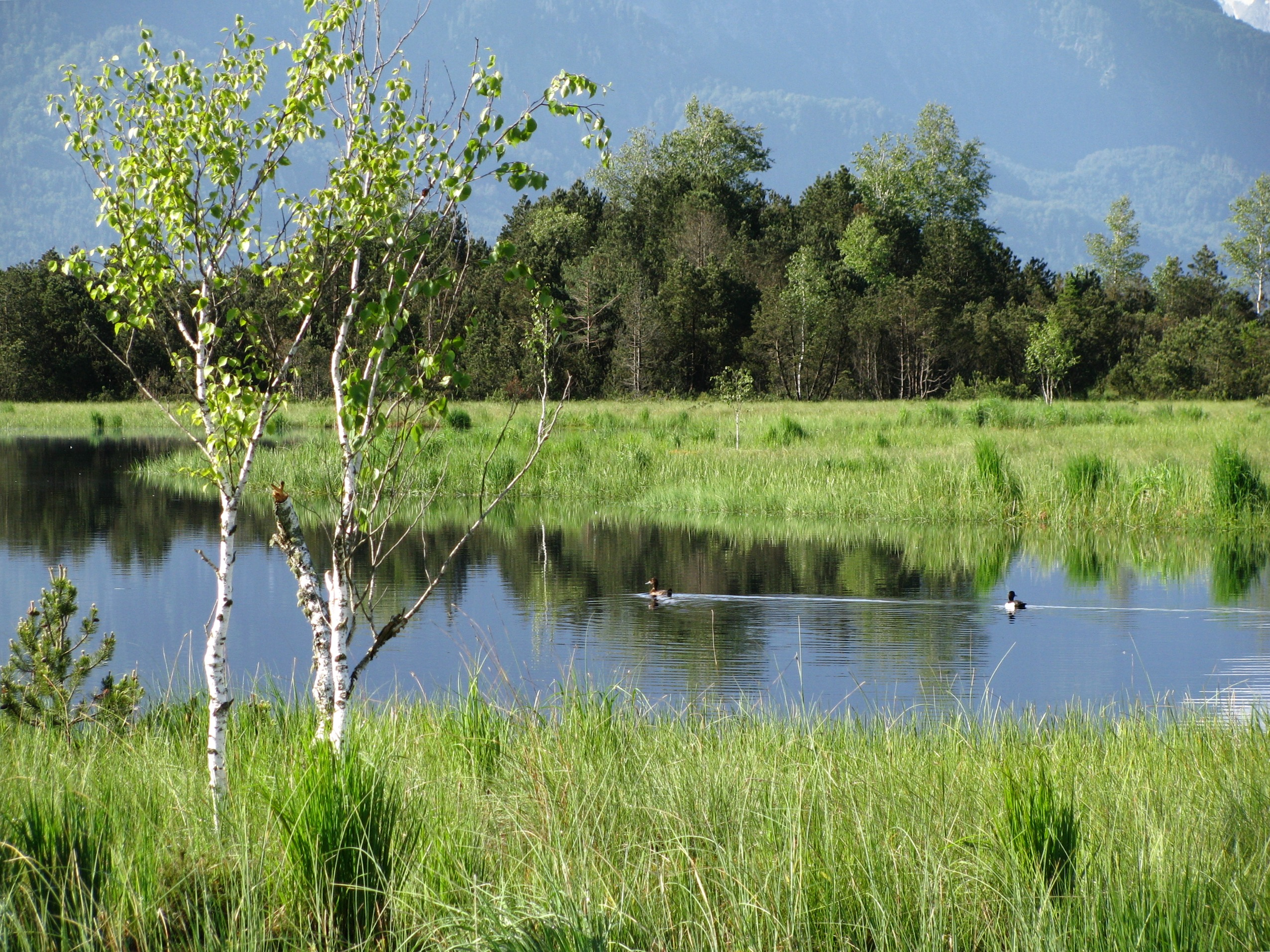 NSG Sindelbachfilz, Fichtsee